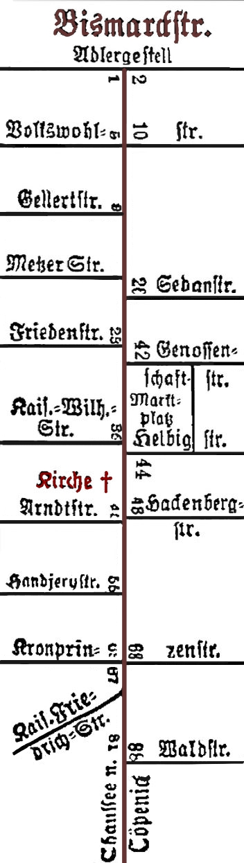 Berlin-Adlershof, ehemalige Bismarckstraße mit allen Nebenstraßen